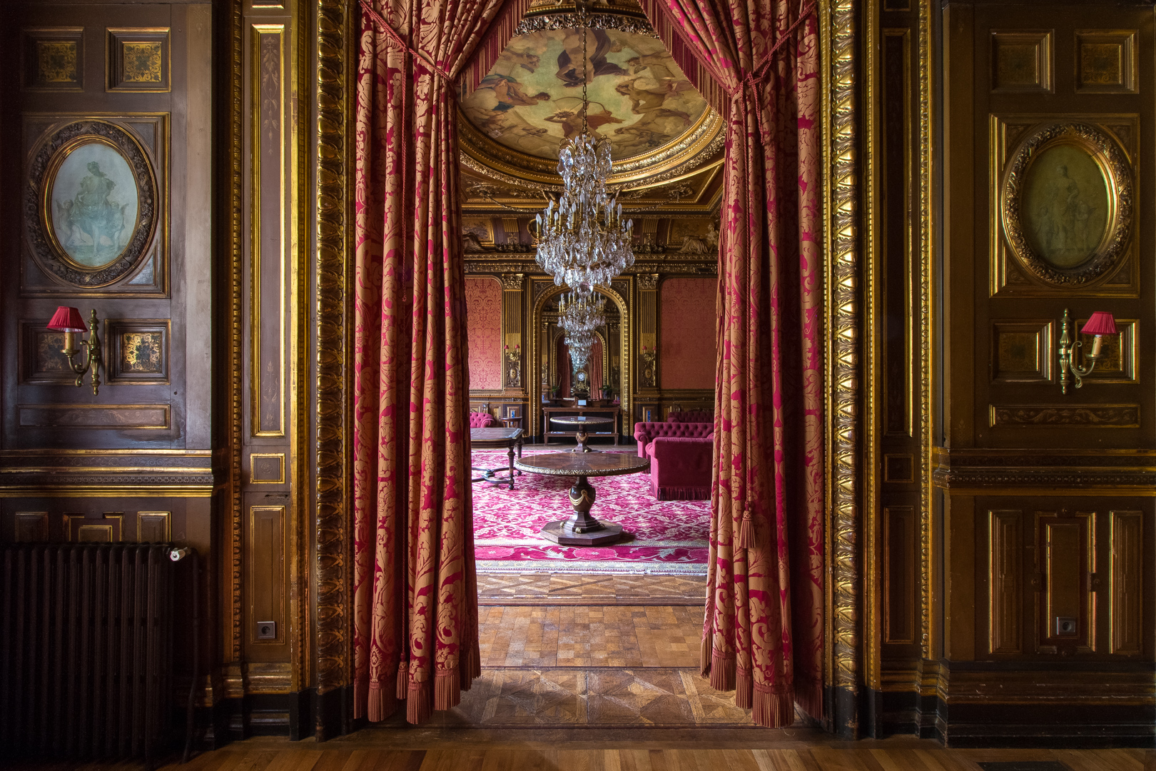 Vue sur le grand salon décoré par Paul Baudry et Eugène Delaplanche. .